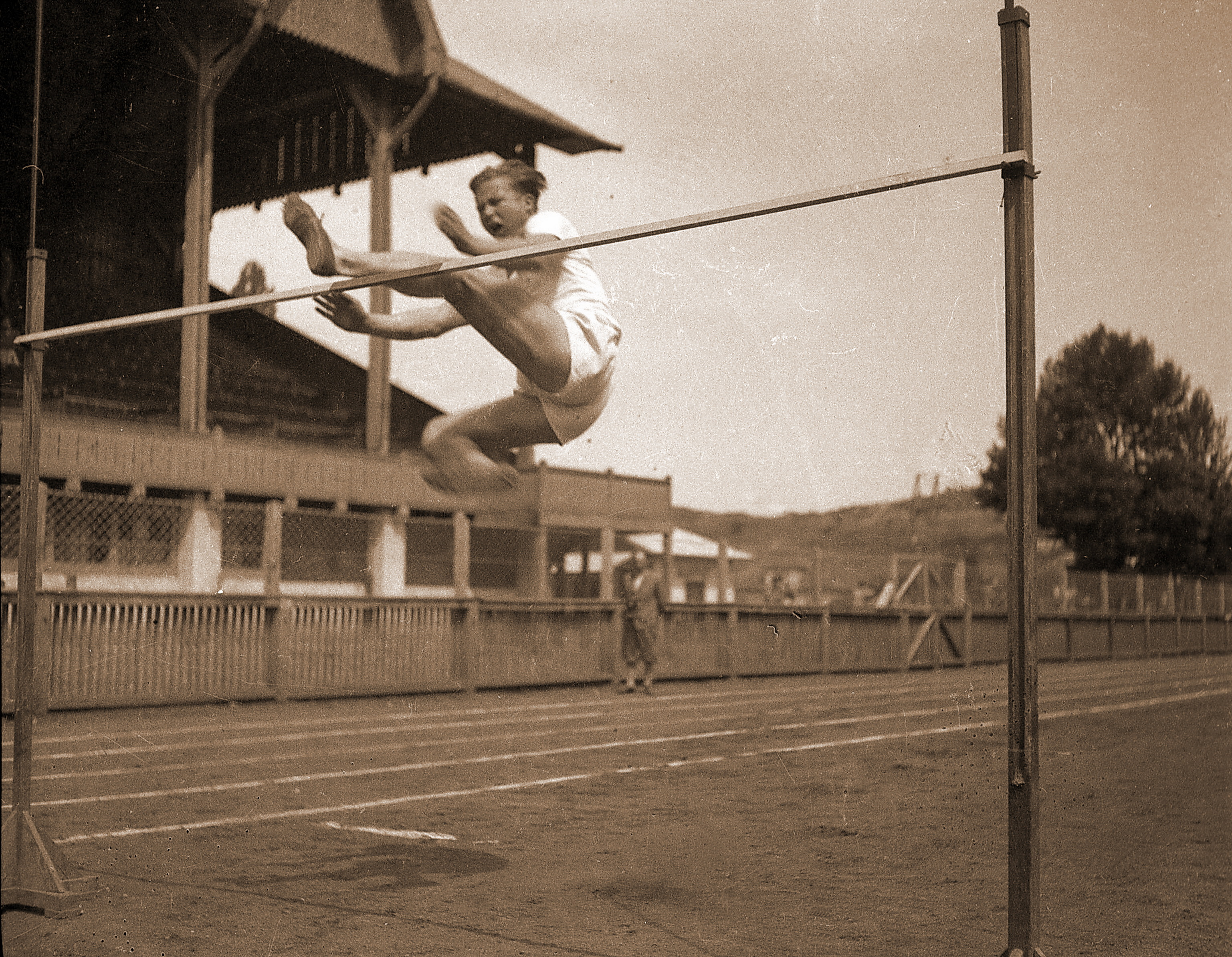 antrenament